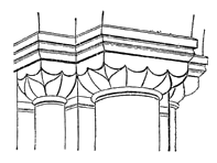 Faltenkapitäl